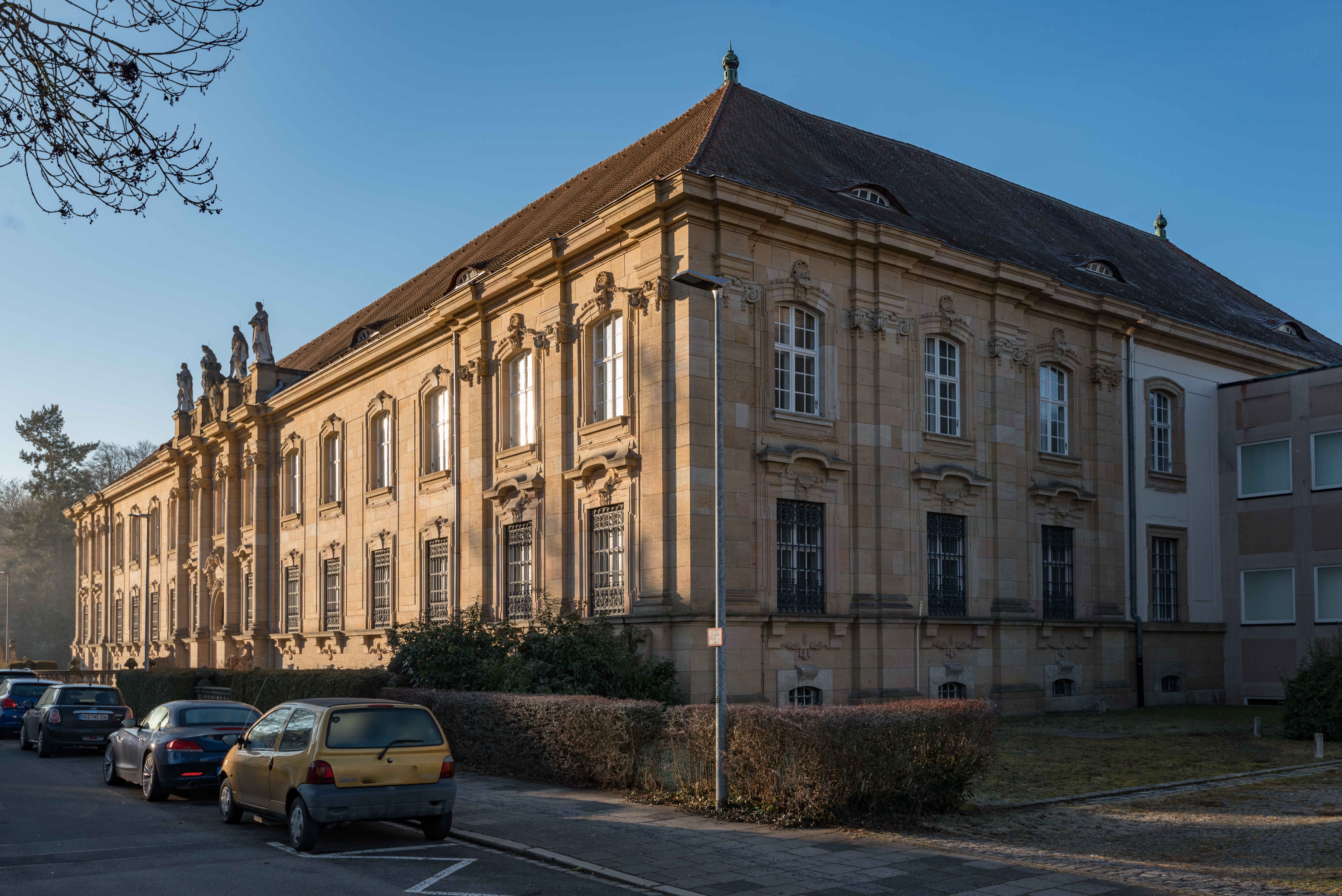 Bamberg, Hainstraße 39, Ansicht Sodenstraße